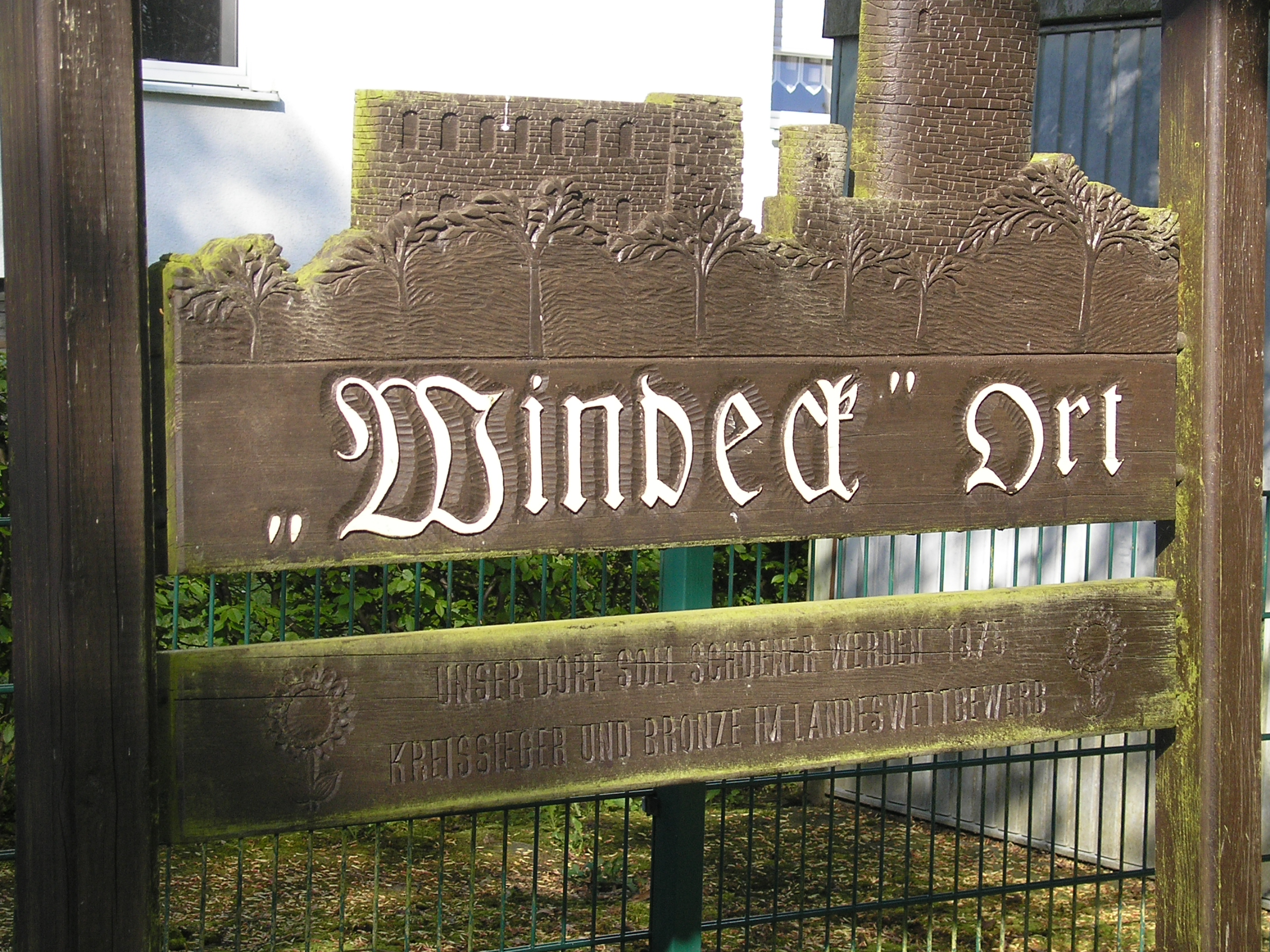 Ortsschild Altwindeck - Unser Dorf soll schöner werden 1975, Kreissieger und Bronze im Landeswettbewerb